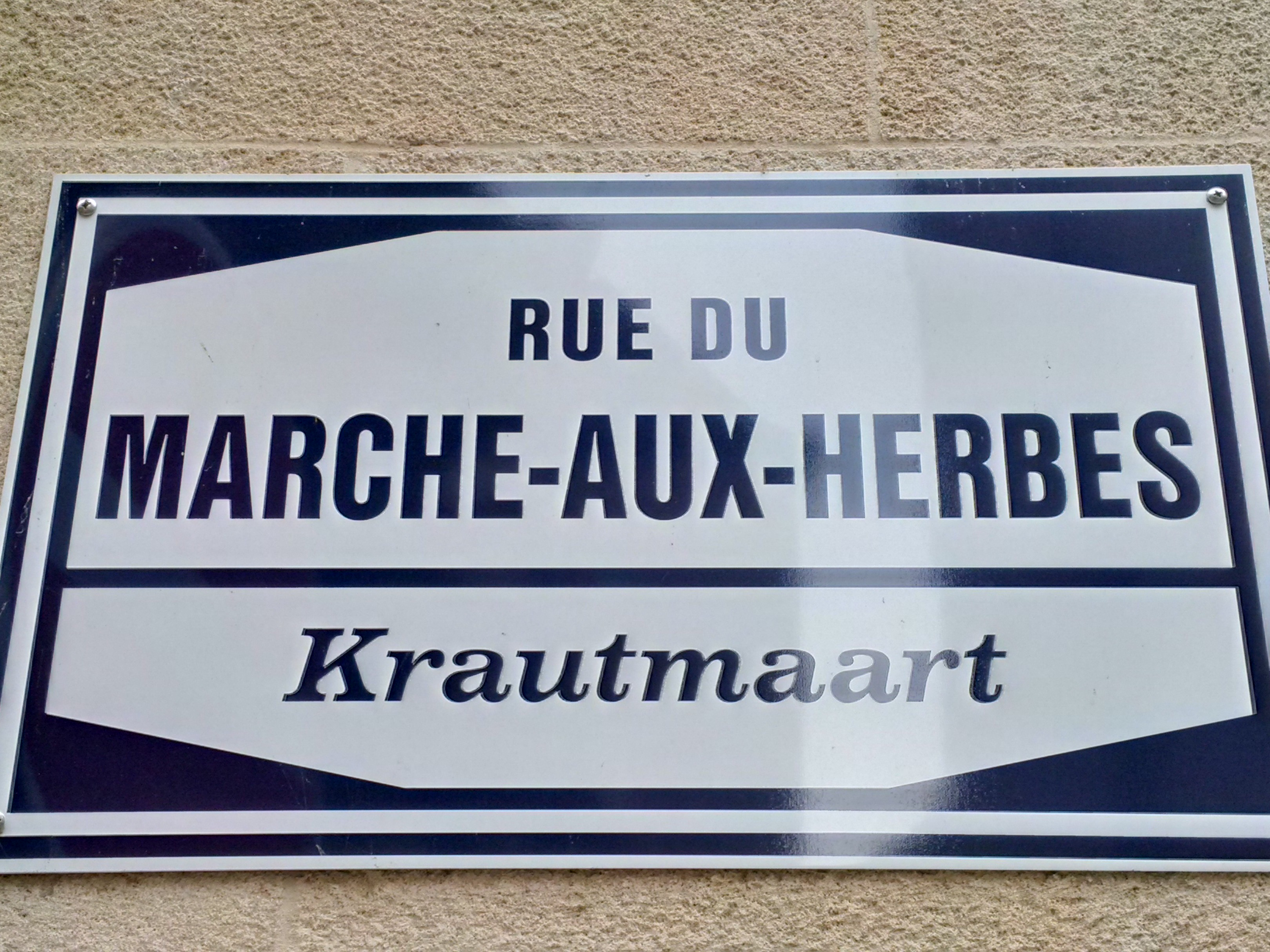 Stroosseschëld an der Stad Lëtzebuerg